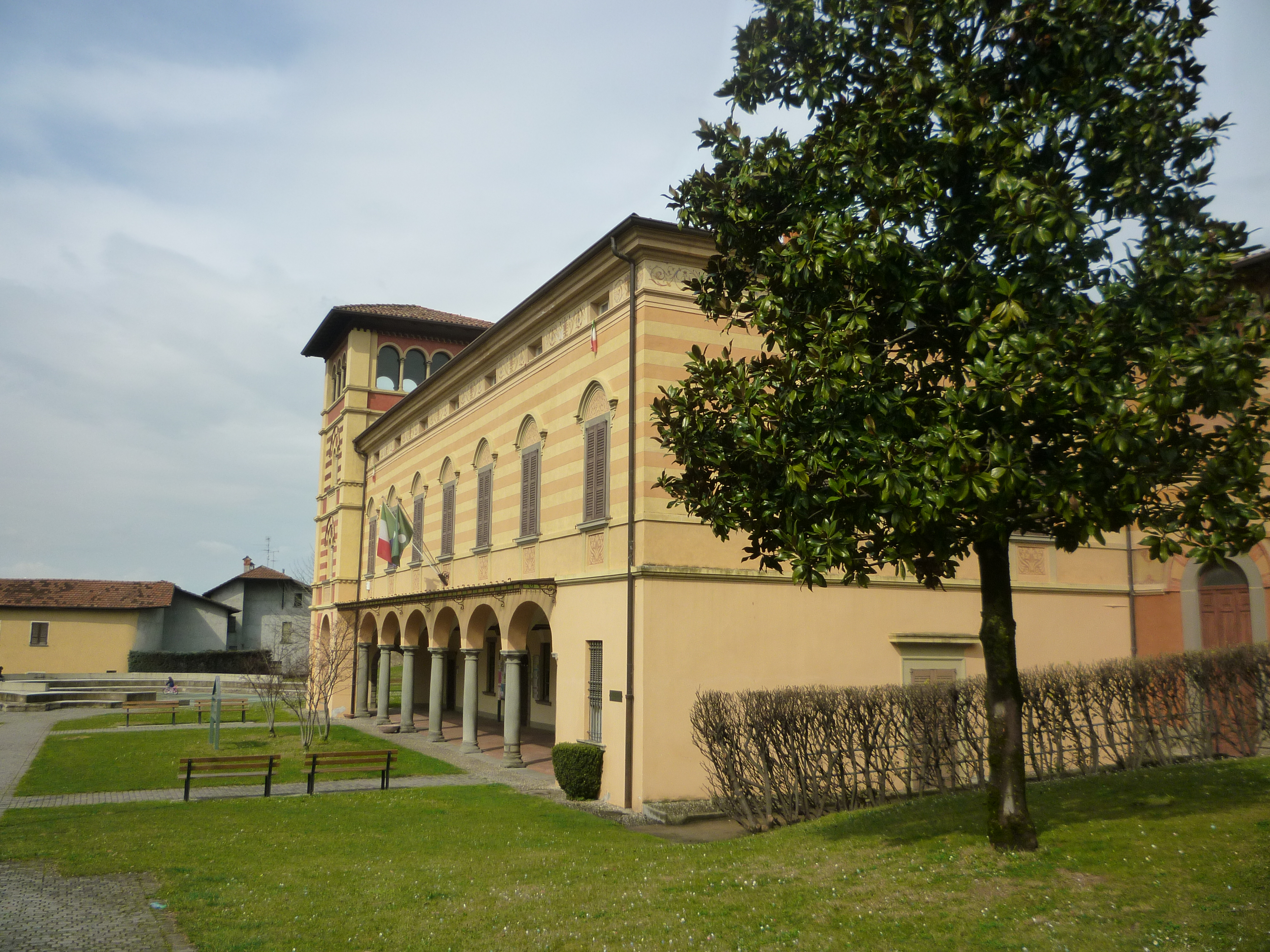 Erbusco